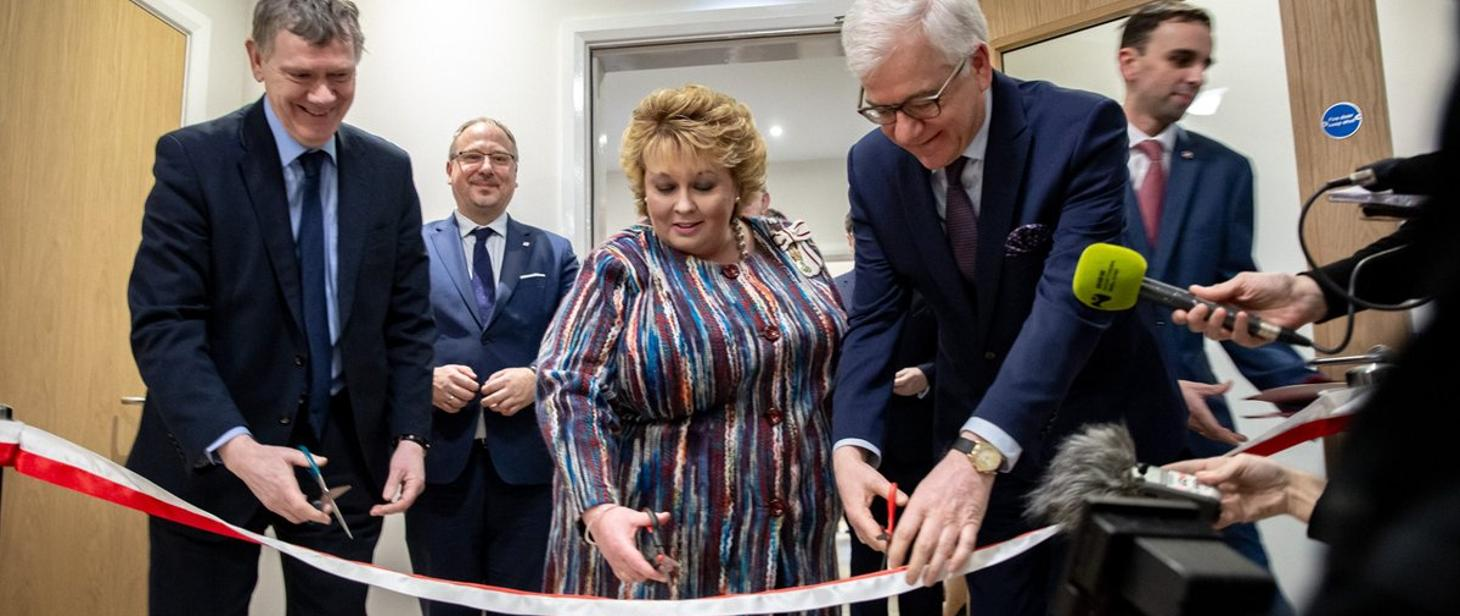 Minister Czaputowicz otworzył Konsulat Generalny RP w Belfaście